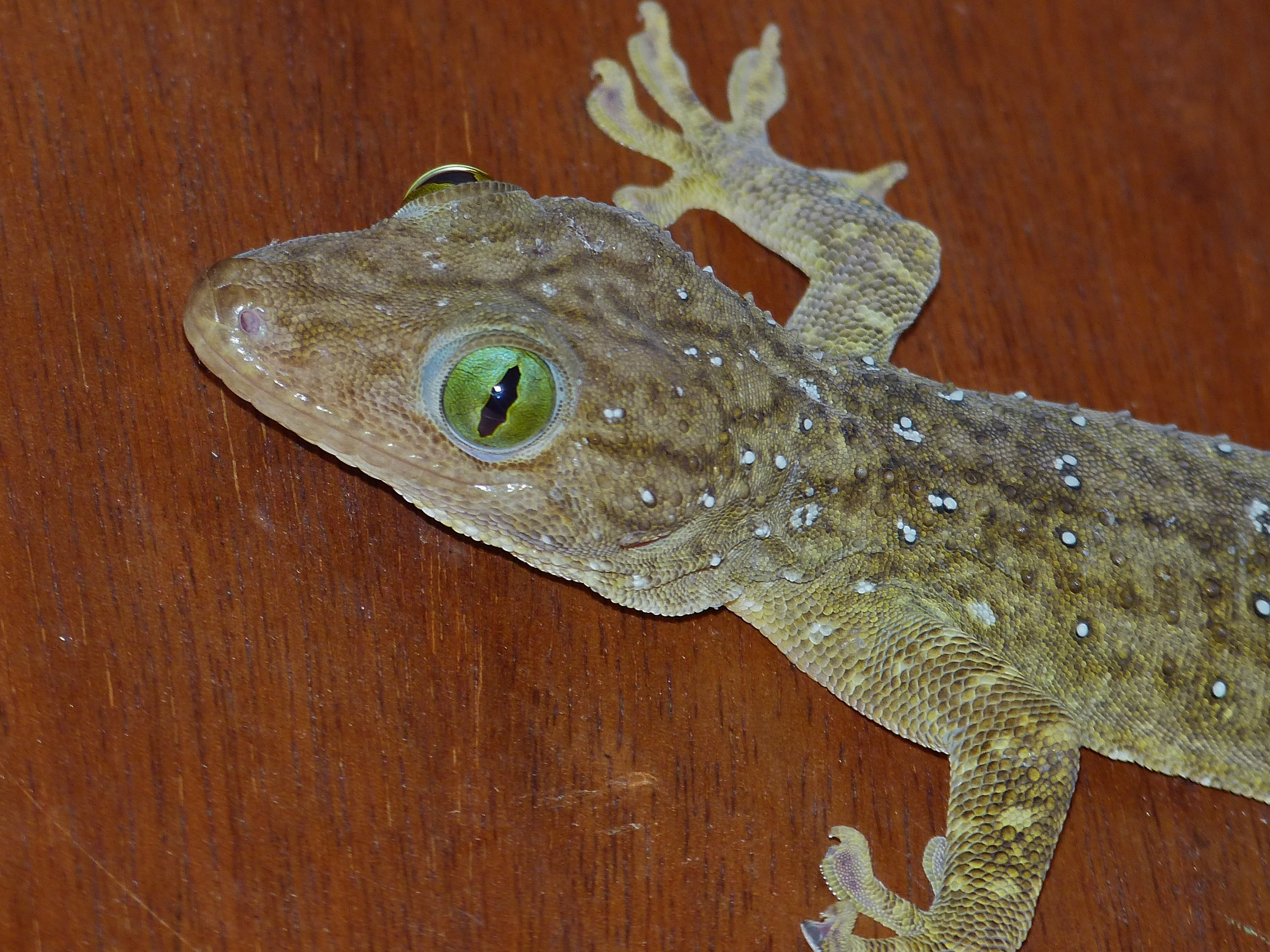 Bilit, Sabah, MALAYSIA